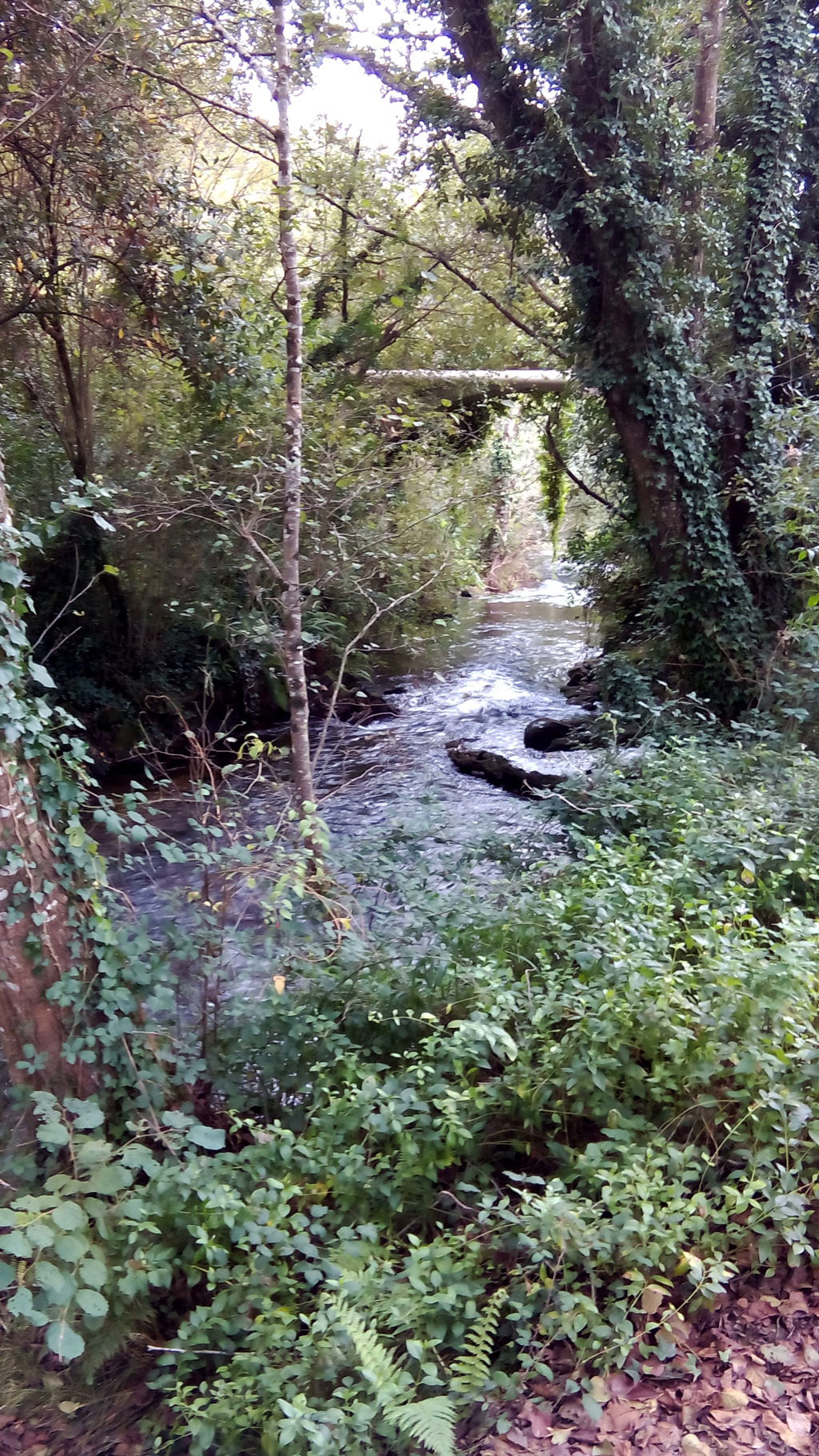 O río Anllóns ao seu paso por Coiro, A Laracha